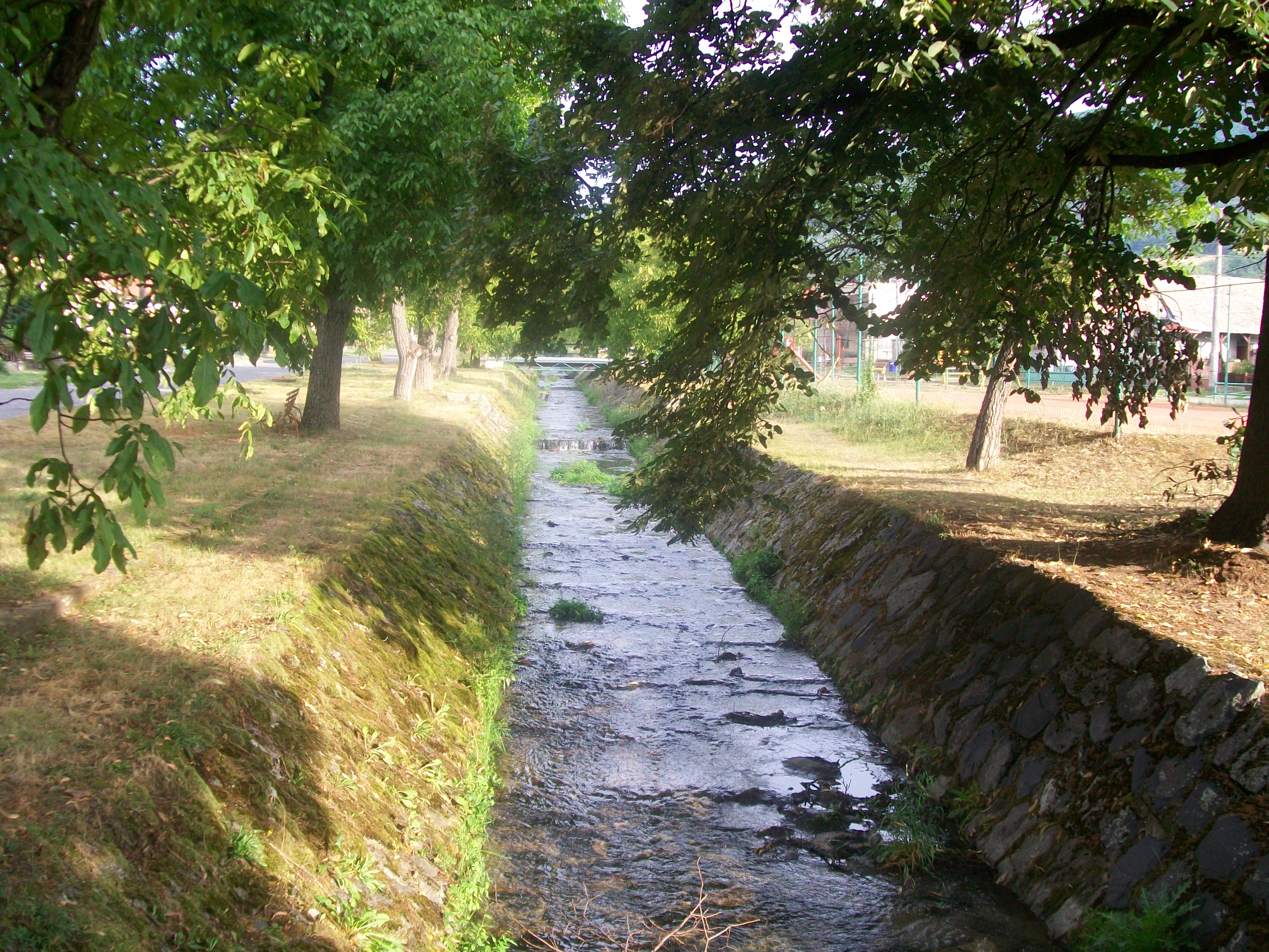 Dobročský potok pretekajúci obcou Dobroč